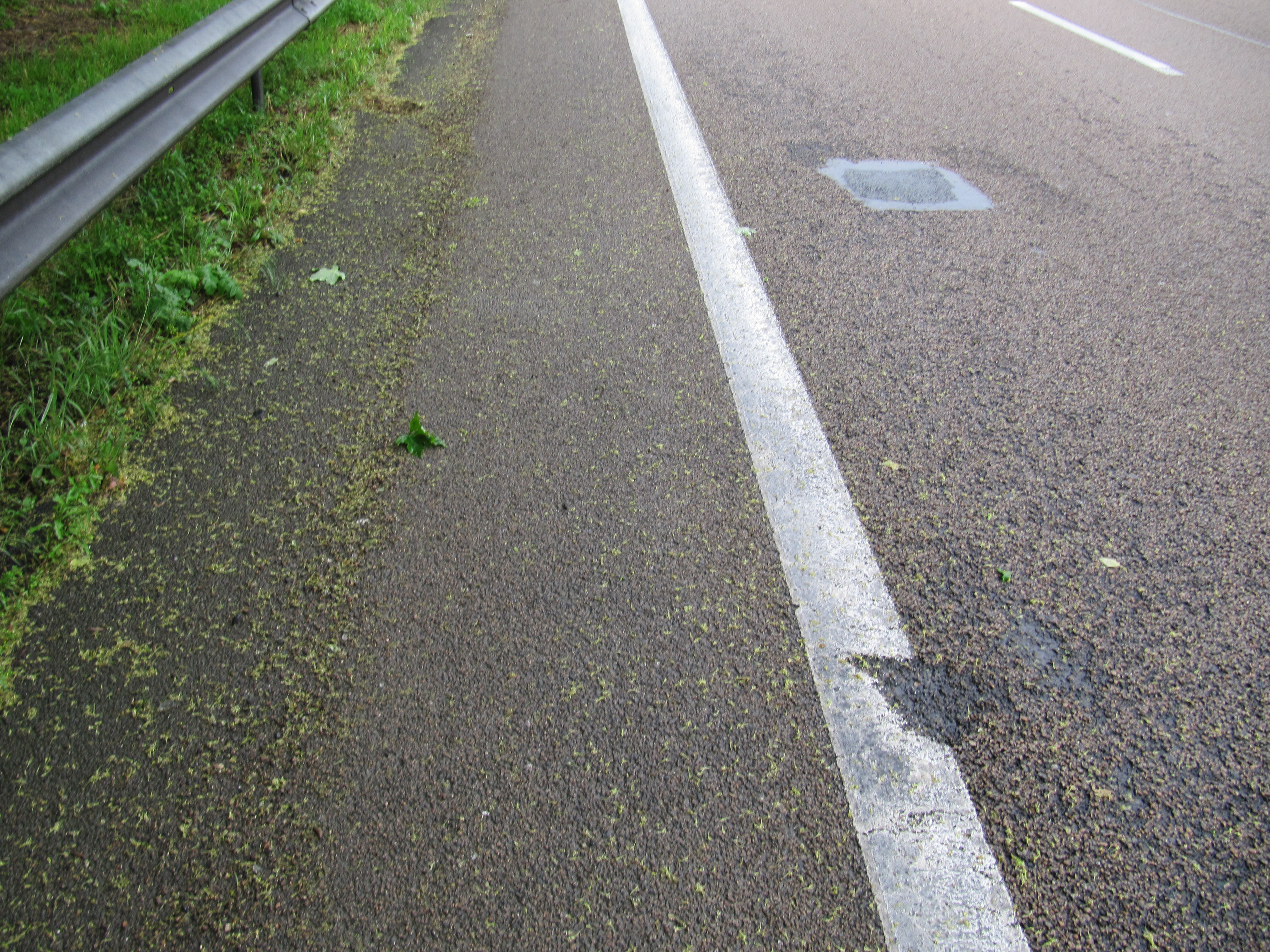 Il manque de la peinture et une réparation parfaite.